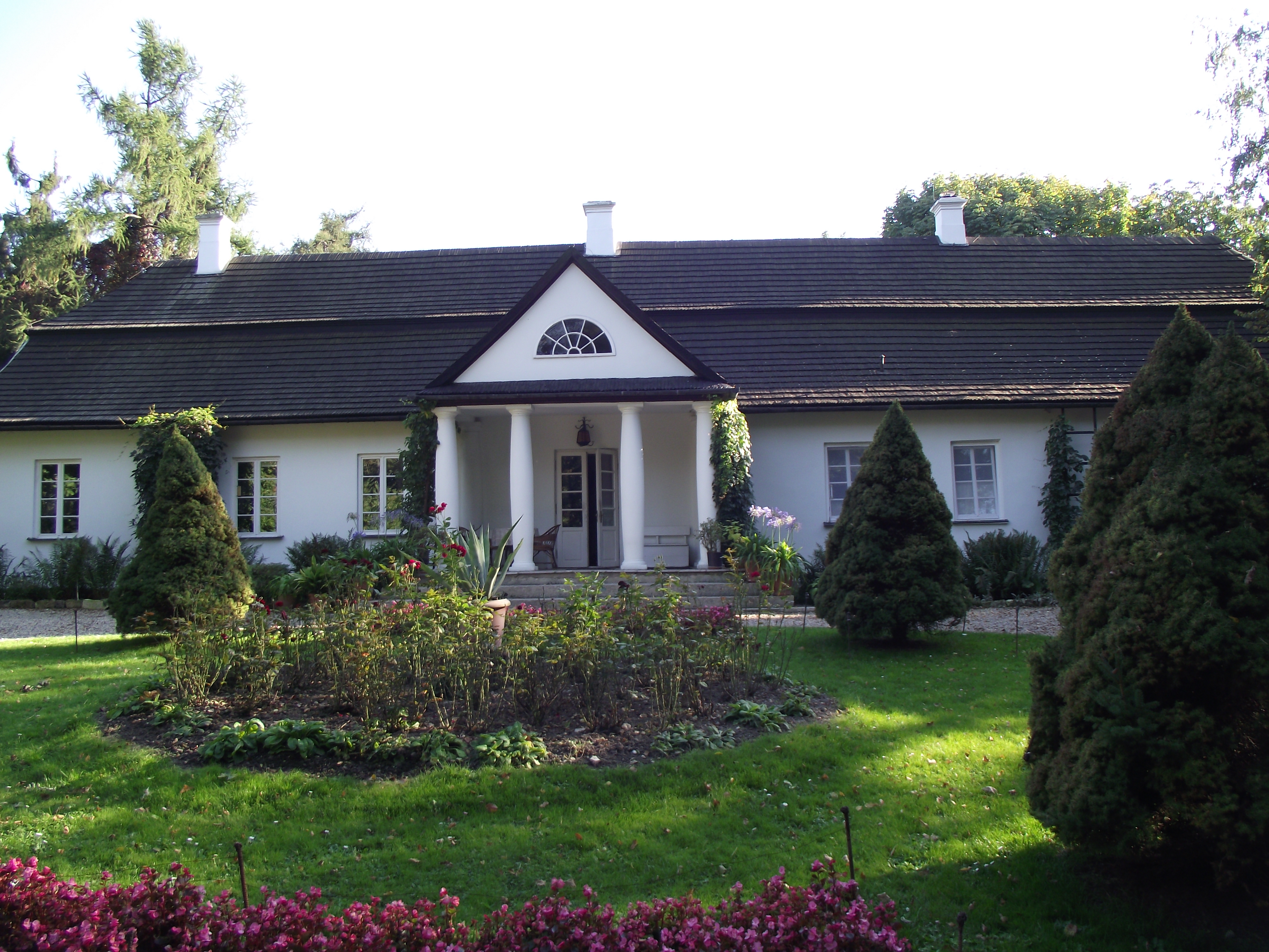 Glanów - dwór, 2 poł. XVIII, 1863, l. 20.XX